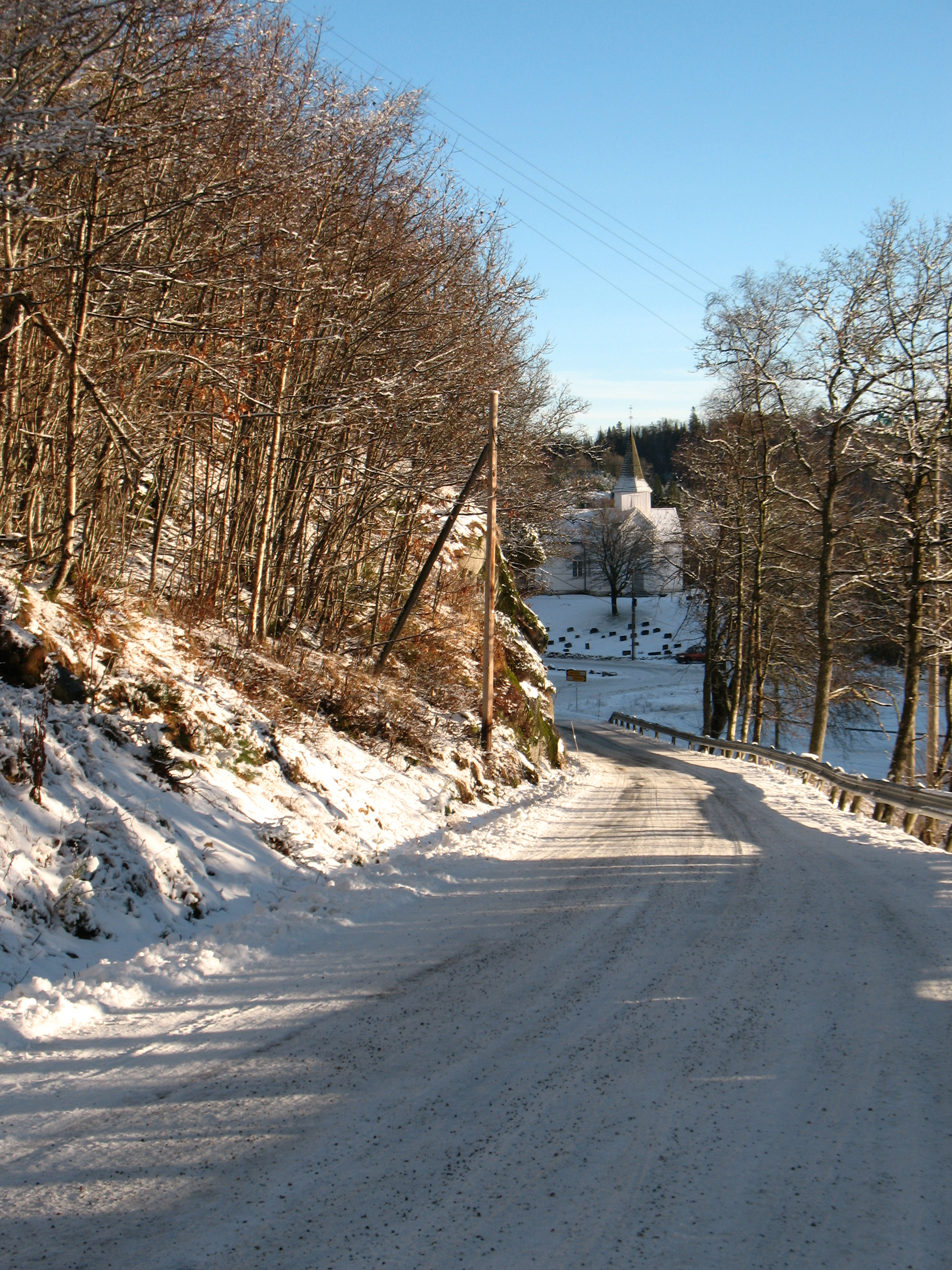 Fylkesvei 54 i Vennesla kommune, Vest-Agder ved krysset med FV 454 og Øvrebø kirke.